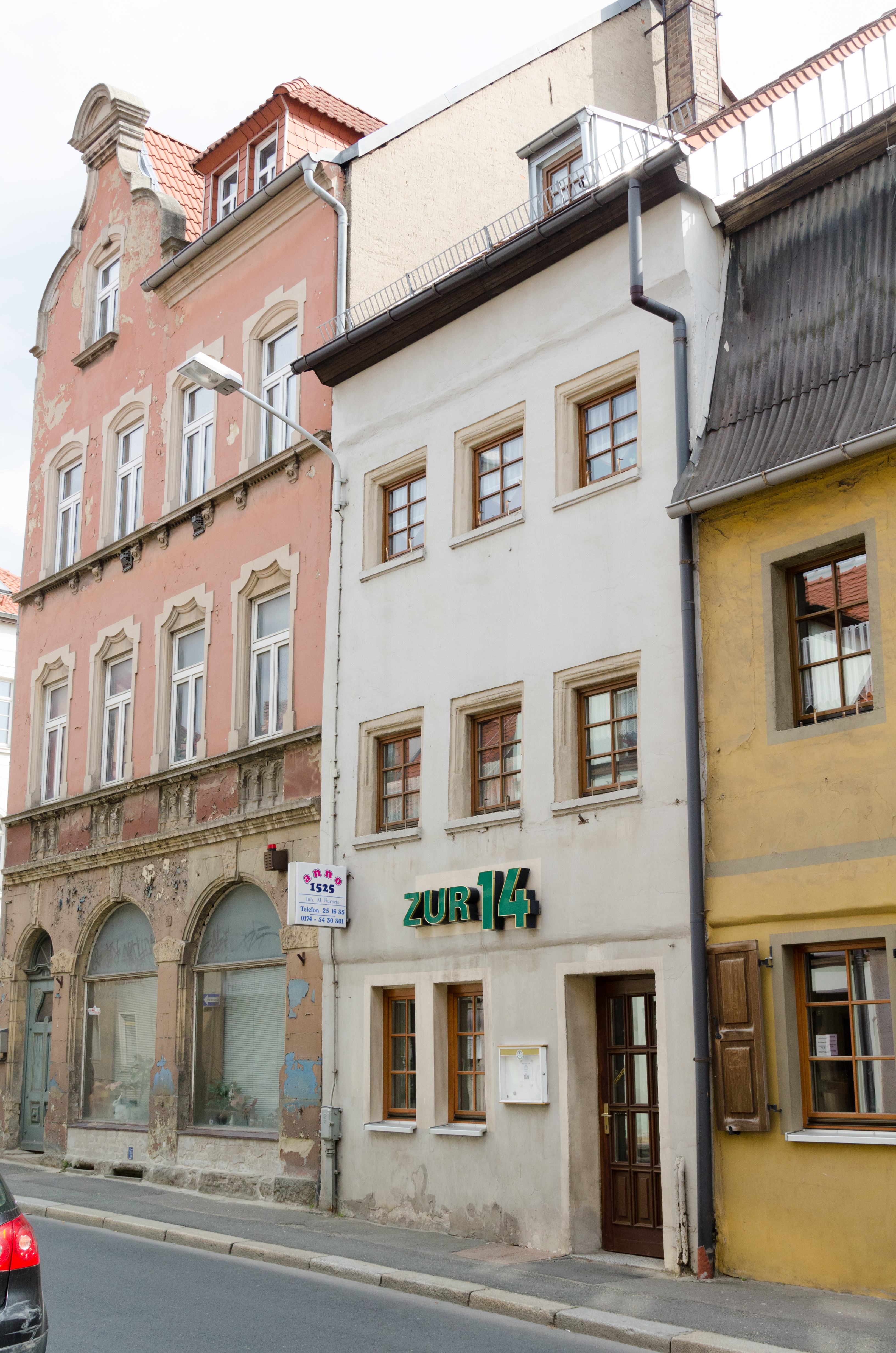 Zeitz, Kalkstraße 14